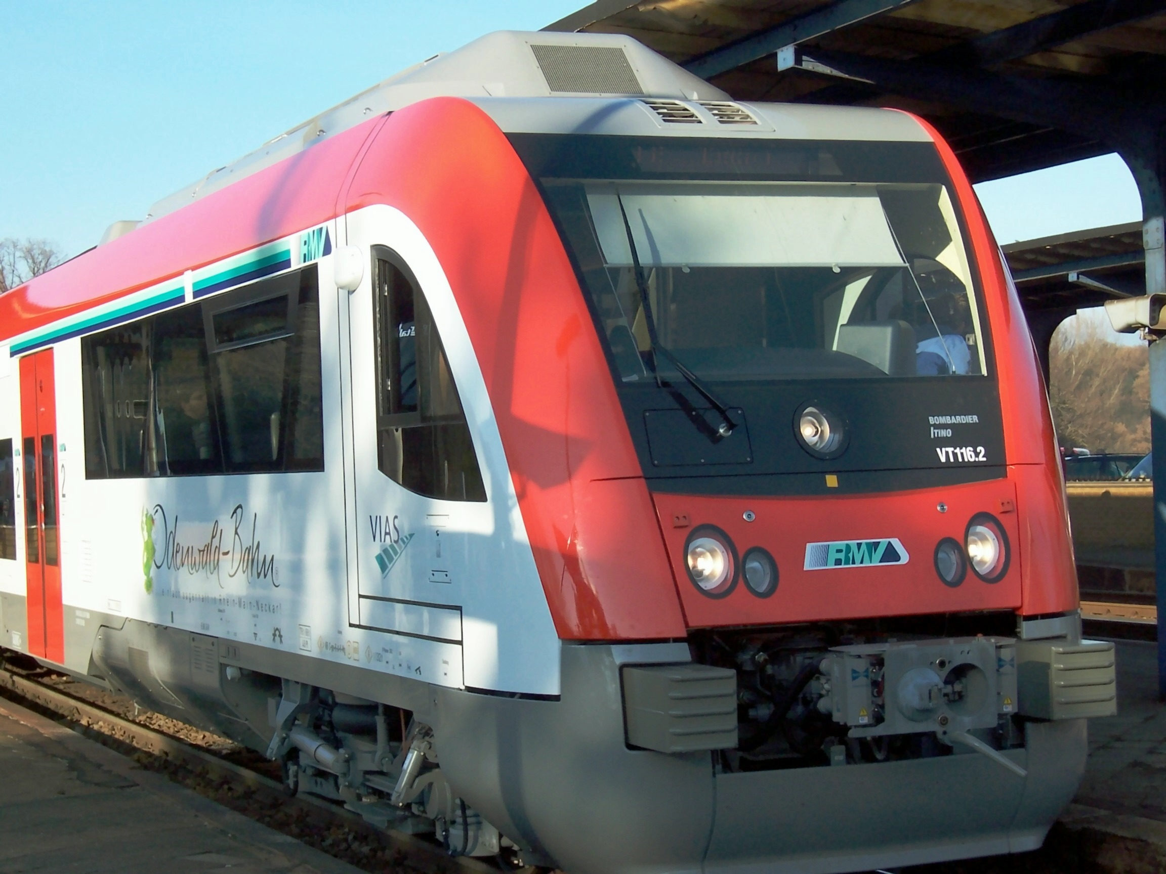 Bildbeschreibung/Description: ITINO D2 der Odenwaldbahn von Bombardier Transportation in Wiebelsbach-Heubach (Groß-Umstadt Wiebelsbach) Quelle/Source: selbst fotografiert/self taken Photo Fotograf/Photographer: Markus Flath Datum/Date: 11.12.2005 Deutschland/Germany